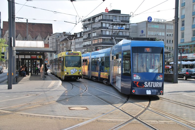 Braunschweiger Trams an der Haltestelle "Schloss" (ehemals "Bohlweg/Damm")